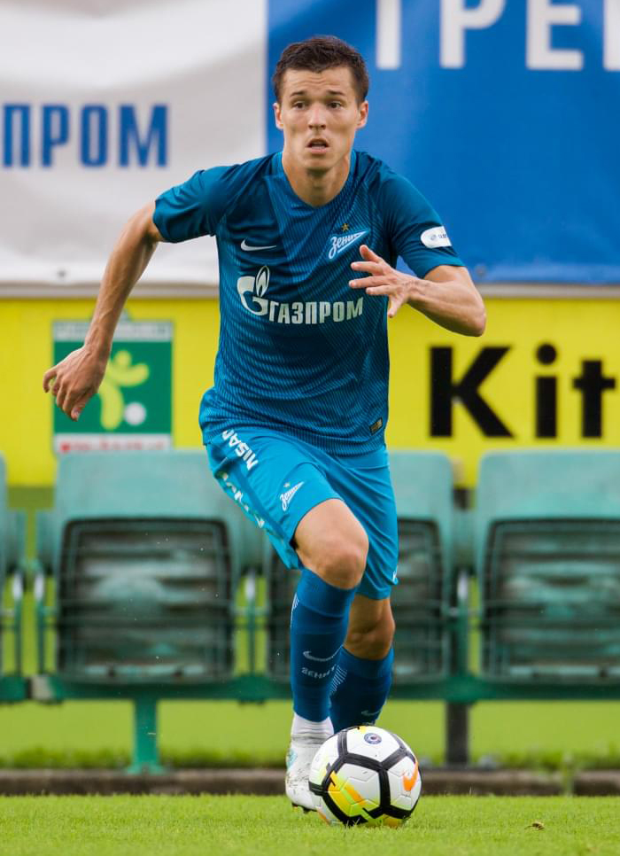 08.07.2017. Австрия, Кицбюэль. Второй «Газпром»-тренировочный сбор в Австрии: двухсторонний матч.